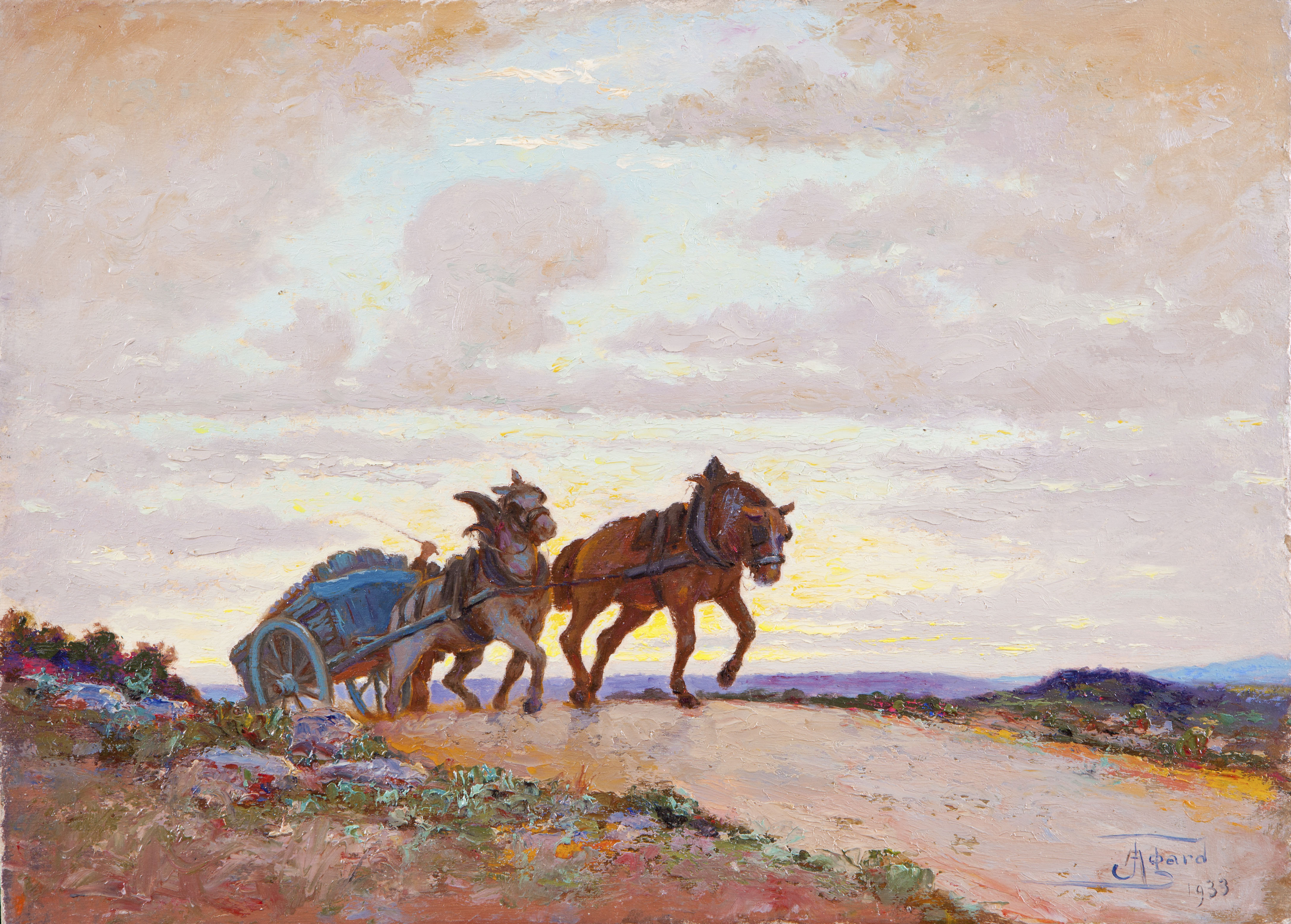 Tombereau au Soleil couchant